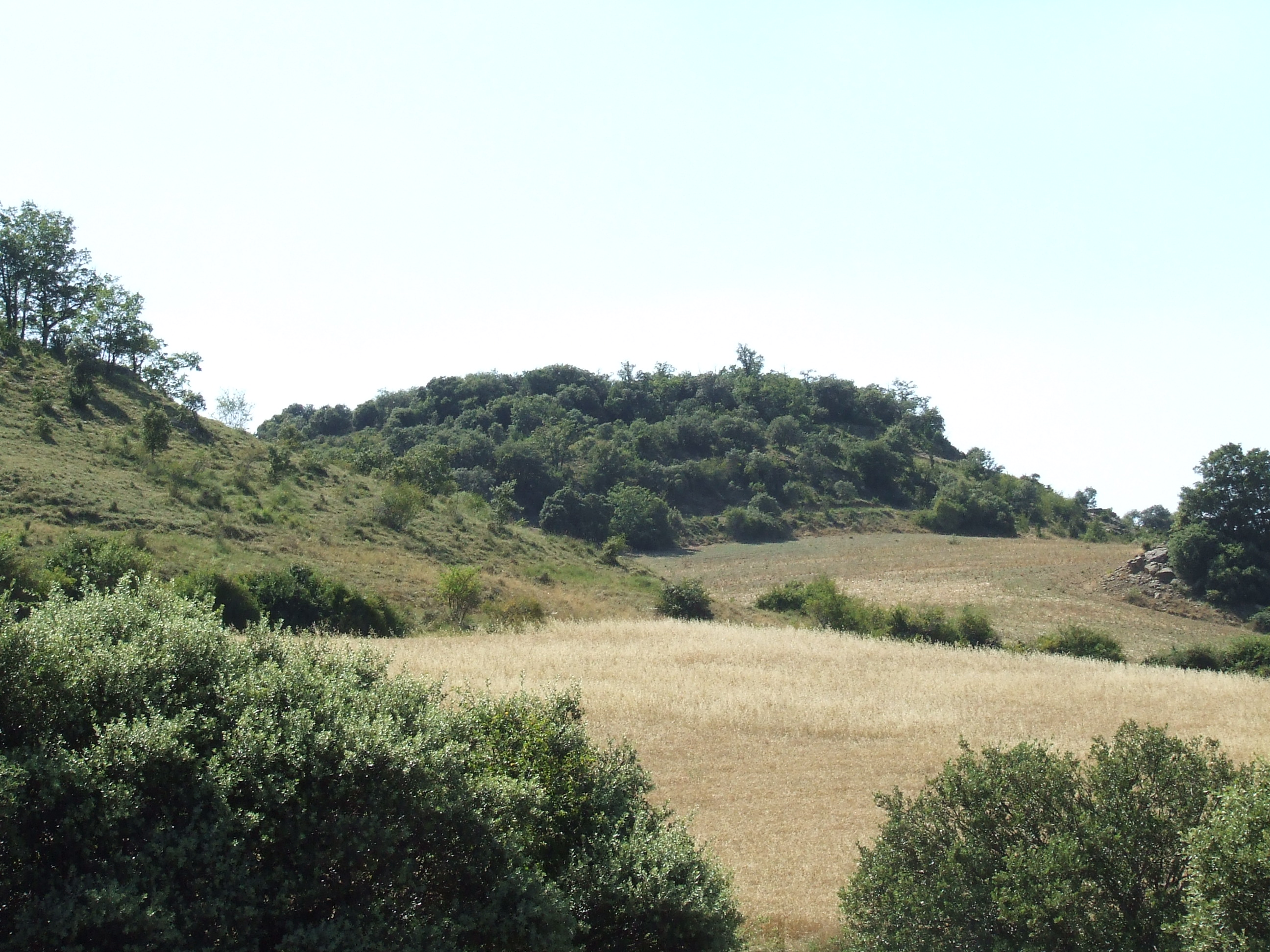 El Tossal de les Barranques (el Meüll, Mur, Castell de Mur, Pallars Jussà)